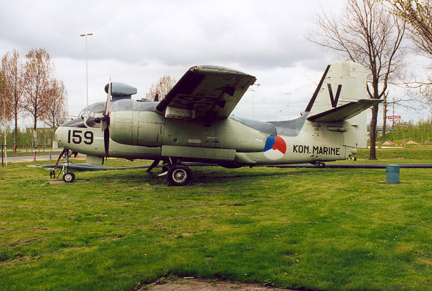 Deze foto is gemaakt door Ramón Vasconcellos en valt onder de "GNU Vrije Documentatie Licentie".